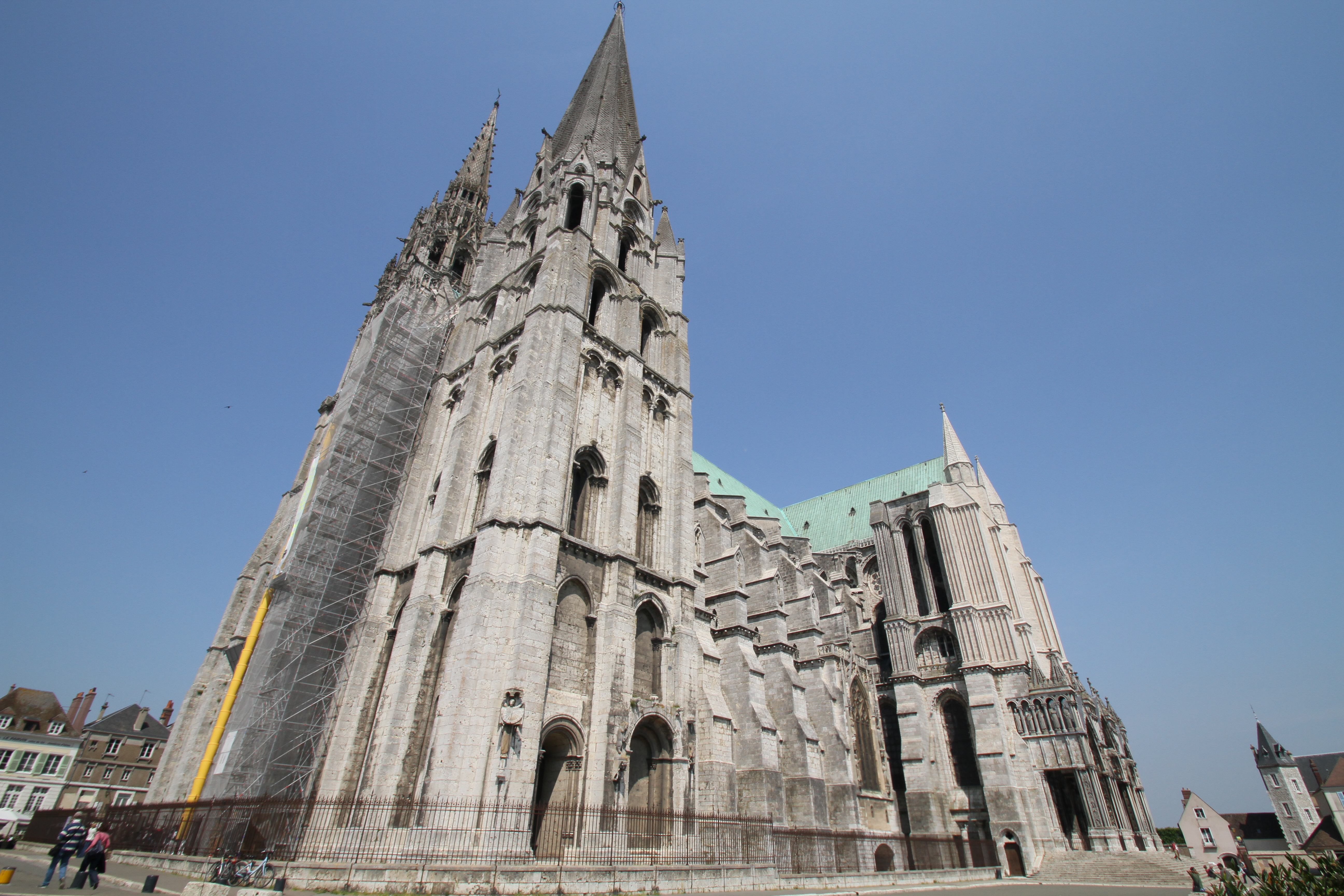 Grand angle sur la Cathédrale de Chartres